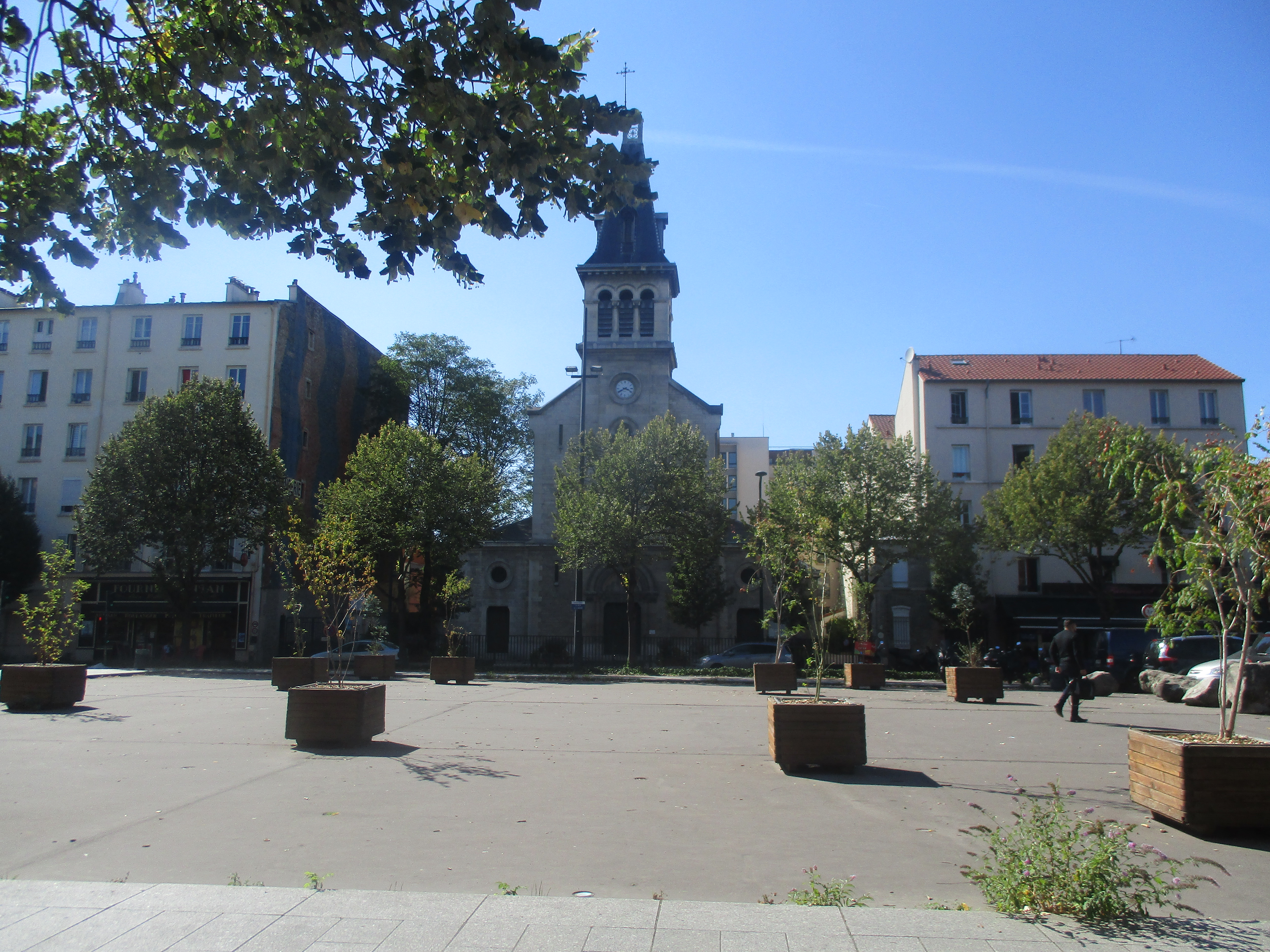 Place de l'église, à La Plaine-Saint-Denis.